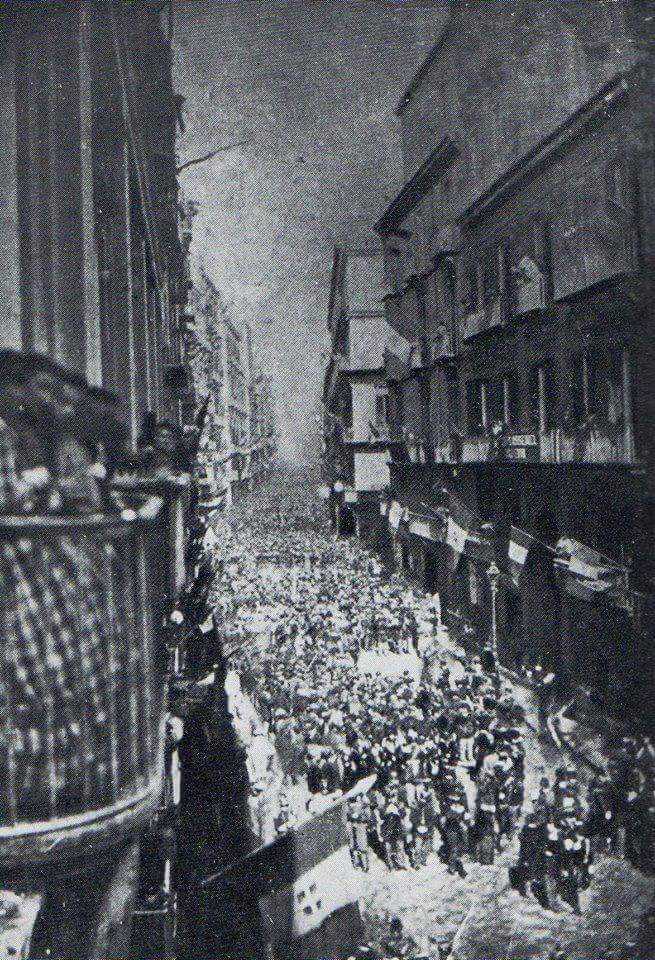 Napoli, via Toledo il 7 settembre 1860 : entrata di Garibaldi e dei Mille a Napoli. ("La folla saluta Garibaldi in via Toledo a Napoli nel settembre del 1860"). Secondo altri invece la foto ritrae i festeggiamenti in occasione di "Roma Capitale", del 1871. Autore sconosciuto. Collezione Guglielmo Cutolo, Napoli.